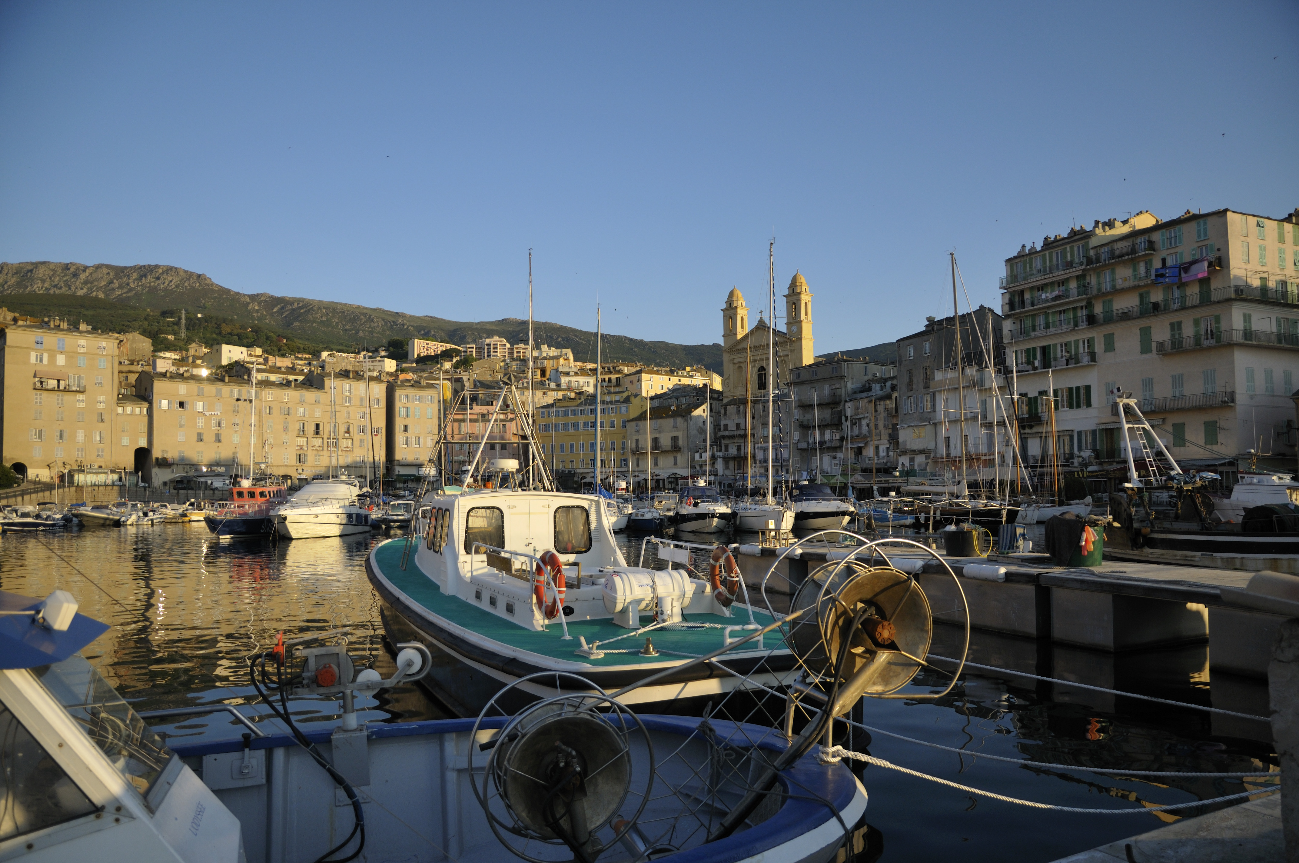 église saint jean baptiste de Bastia corse